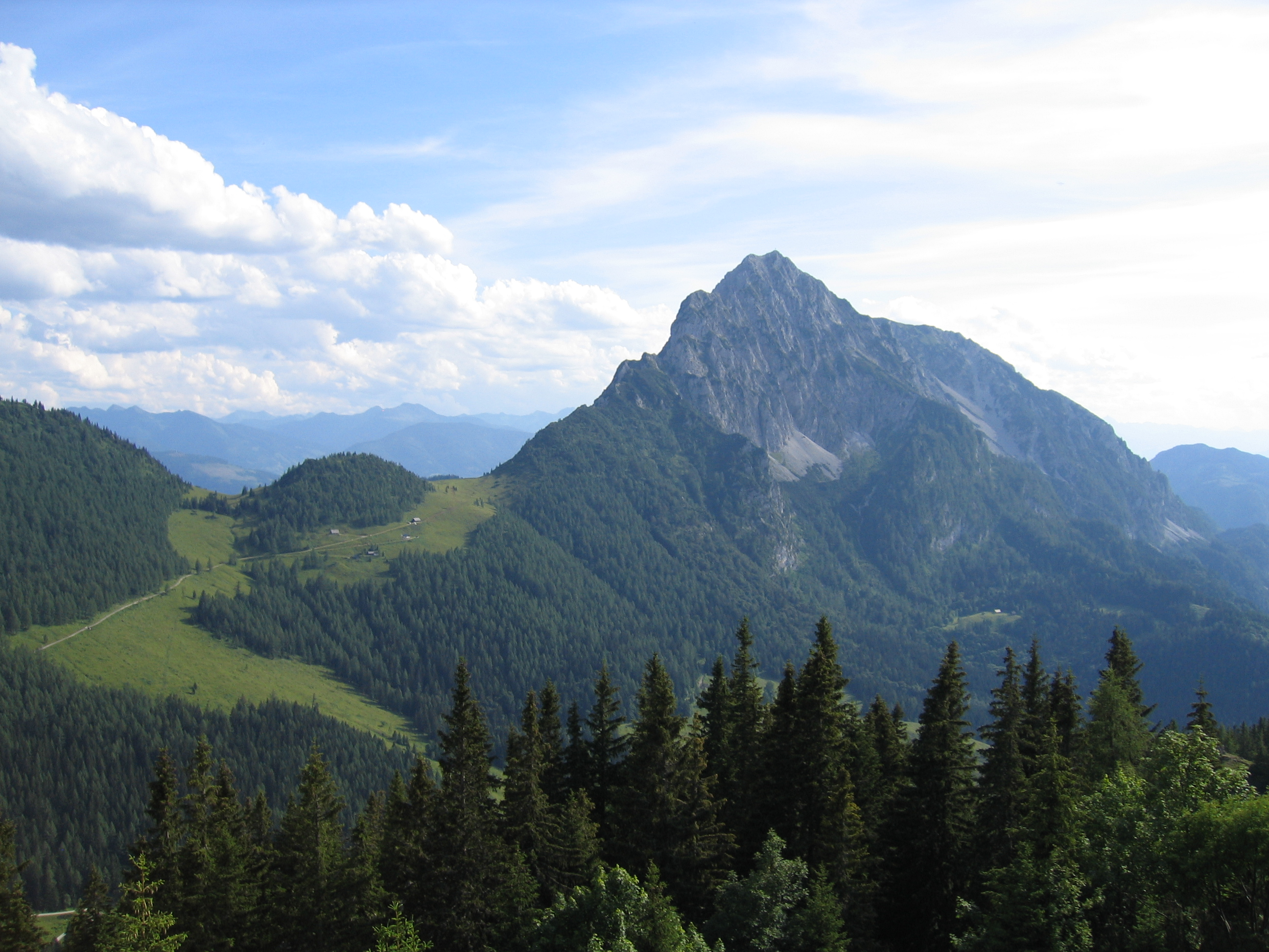 Blick vom Grossen Pyhrgas